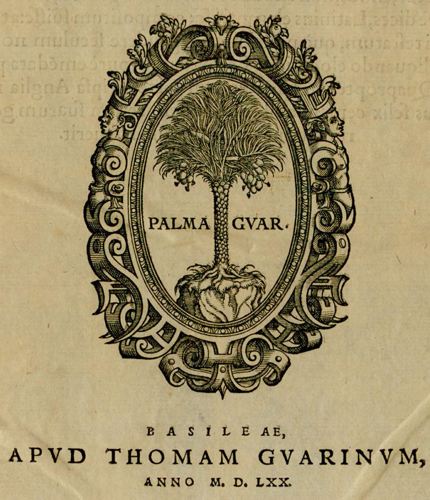 Druckerzeichen von Thomas Guarin, 1570 (Universitätsbibliothek Basel)